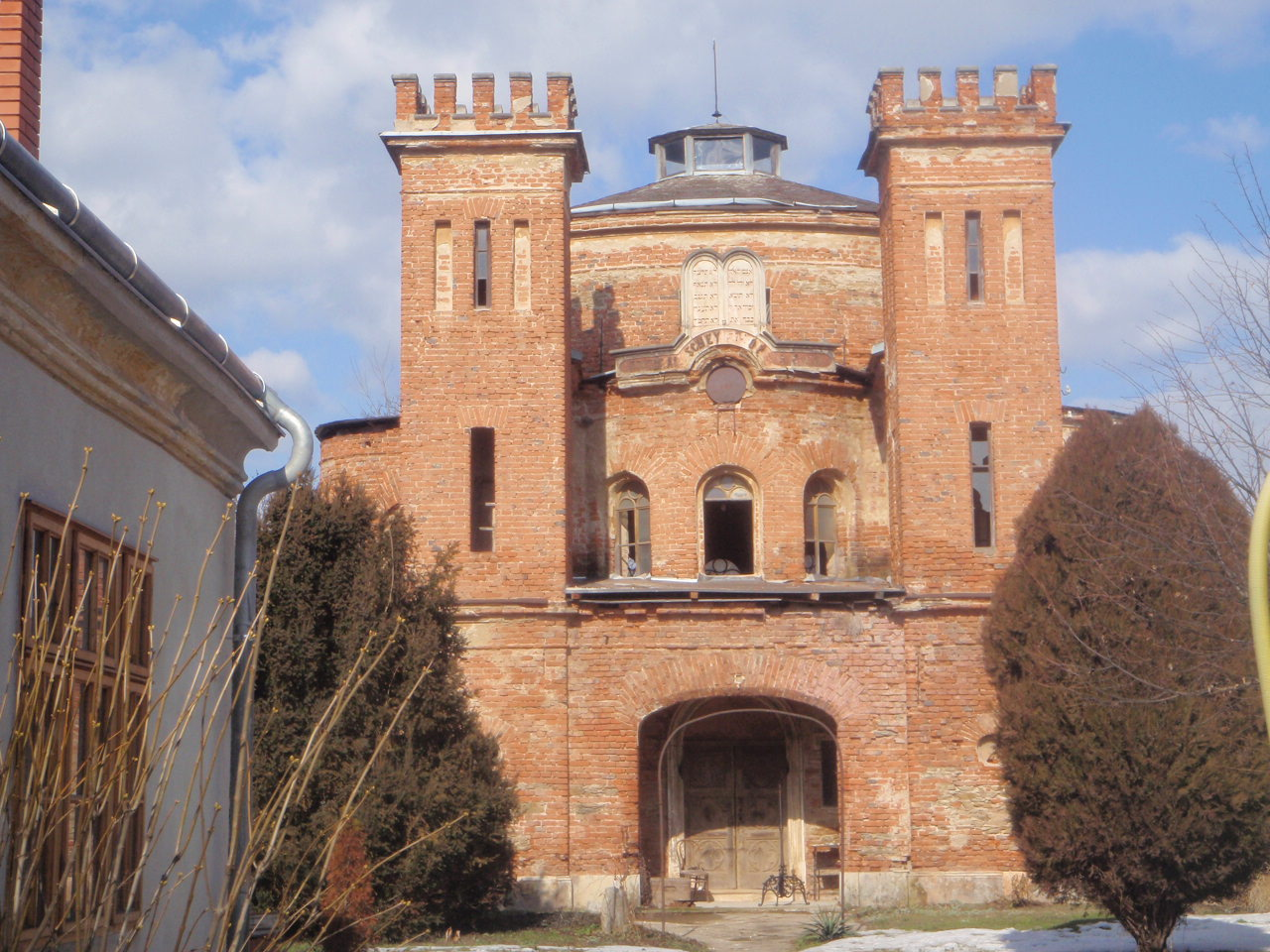 Güns, Synagoge